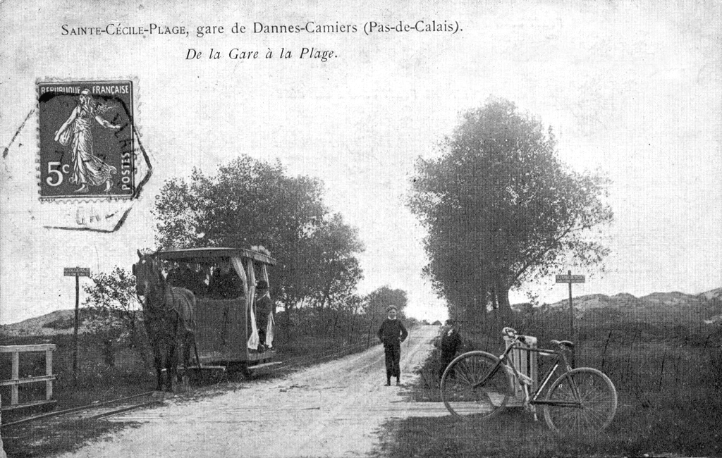 Tramway hippomobile de Dannes-Camiers à Sainte-Cécile (route de la Plage)